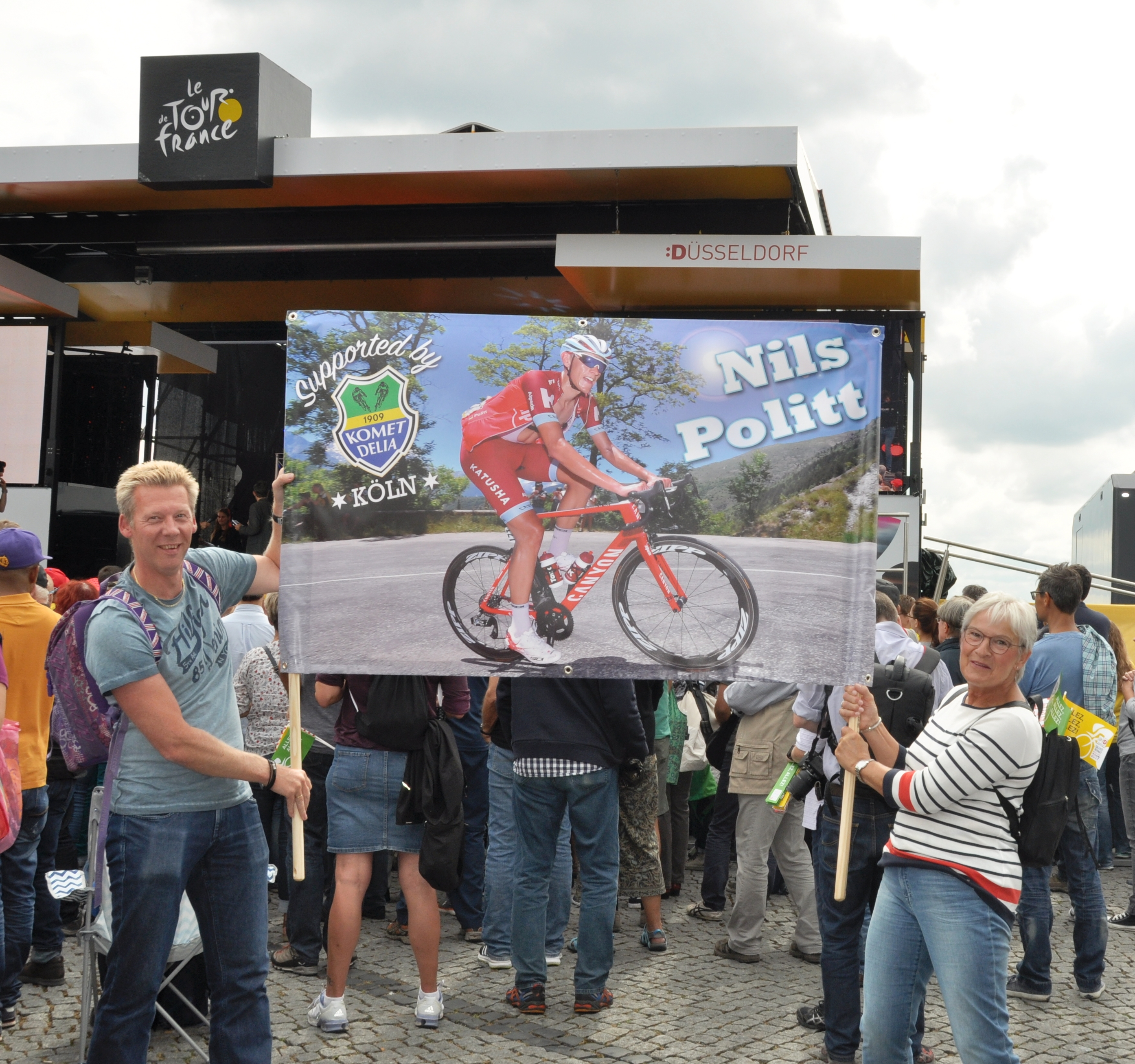 Fans von Nils Politt The making of this document was supported by the Community-Budget of Wikimedia Germany.